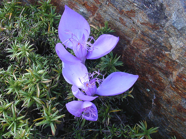 Syn. C. byzantinus, C. iridiflorus. Crocus de Roumanie, N-E de la Yougoslavie et S-W de l'Ukraine poussant entre 130 et700 m sur étendues herbeuses et bois clair. Floraison en septembre octobre. (Photo en culture)